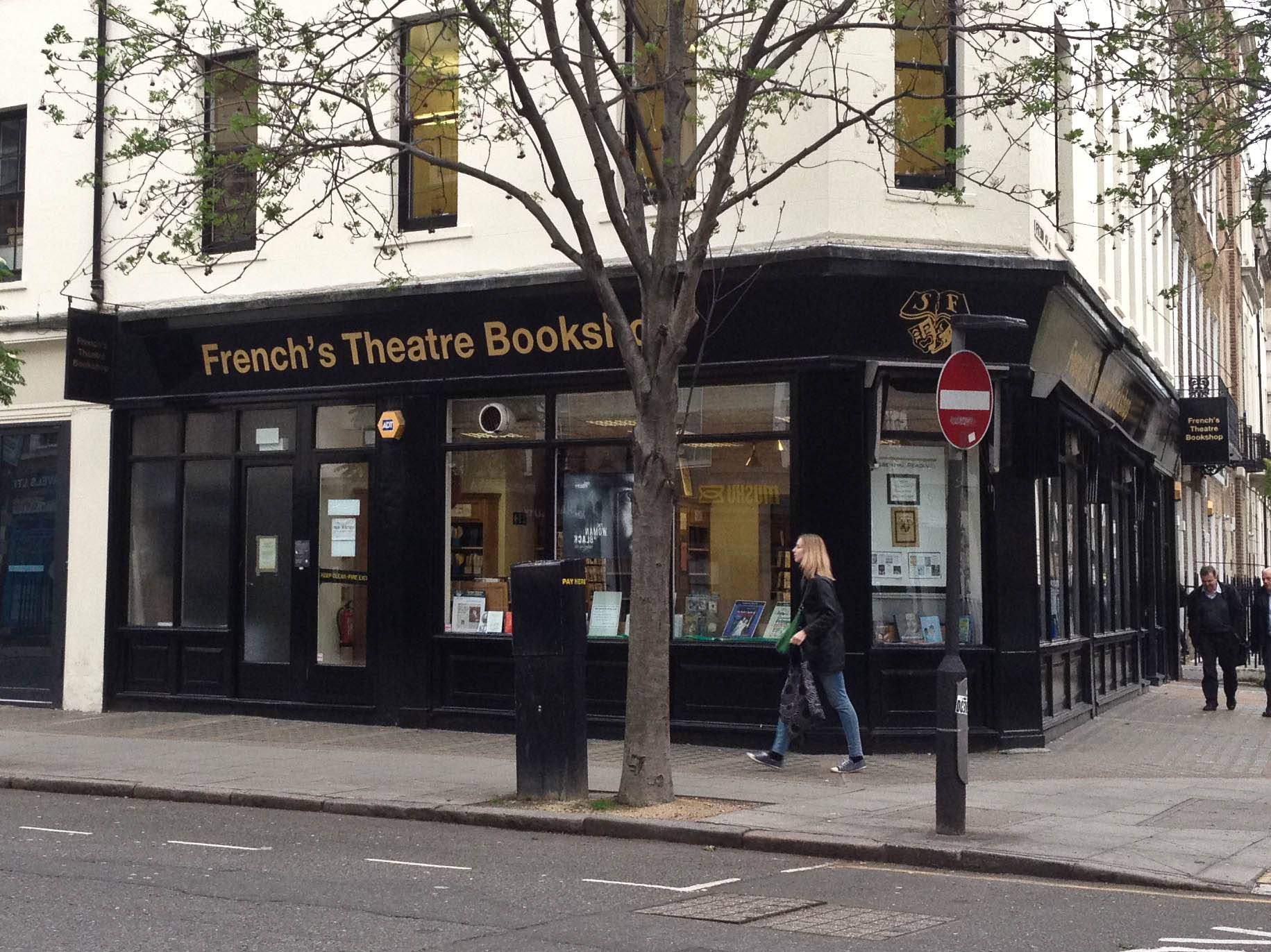 52 Fitzroy Street.